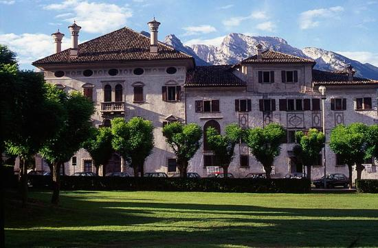 La facciata che dà sul Broi della Villa Crotta - de' Manzoni